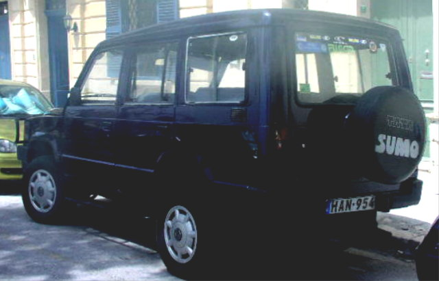 Tata Sumo